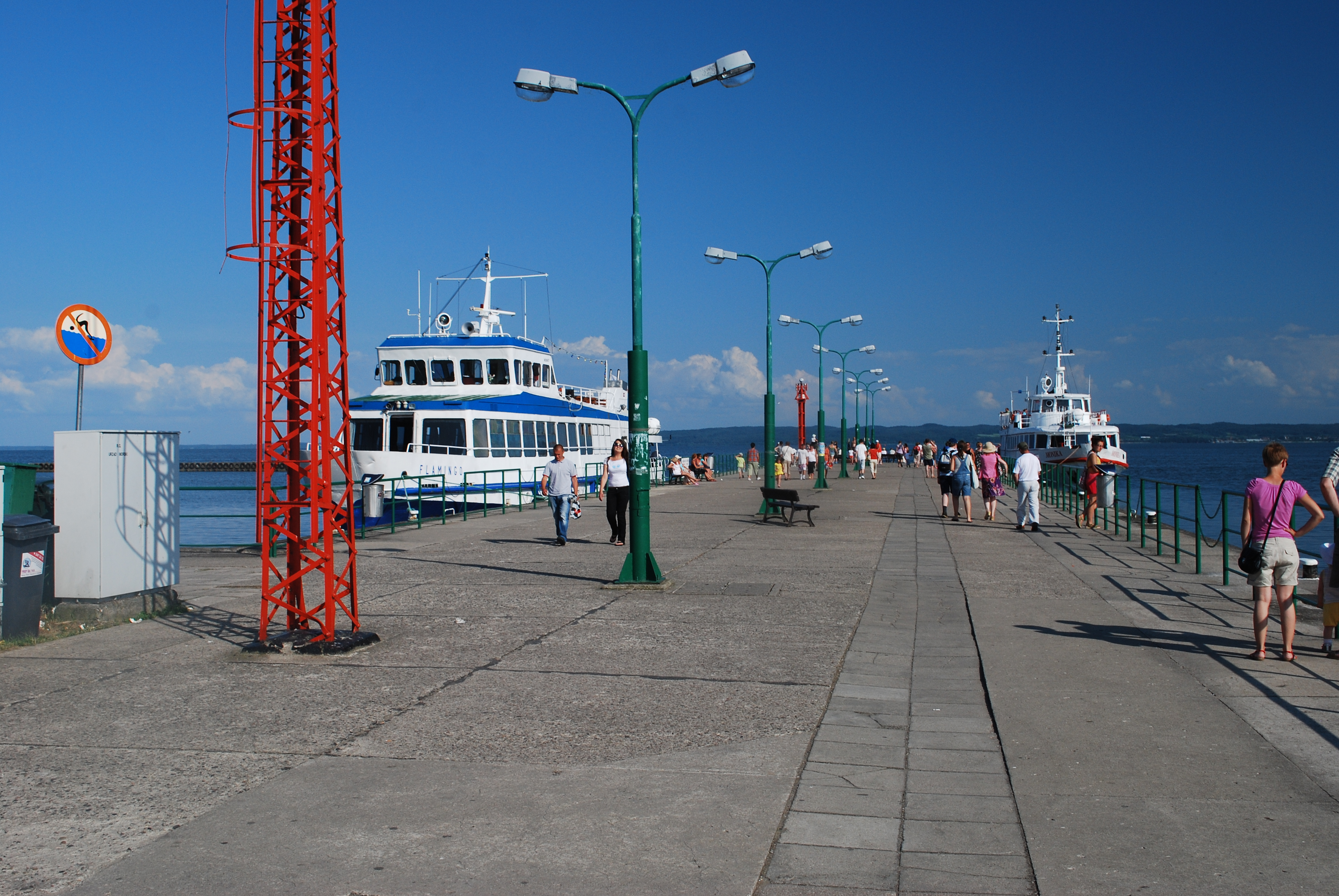 Molo Krynicy Morskiej.